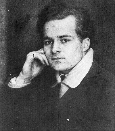 Ducth poet Adriaan Roland Holst